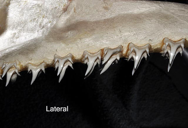 Odontaspis noronhai